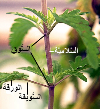 أقسام النبتة.